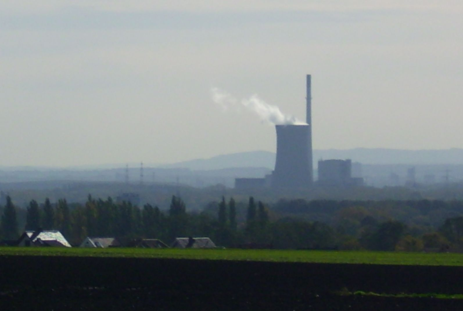 Blick vom Vestischen Höhenrücken, höchste Stelle der am Loh vom vom Lohweg abzweigenden Bergstraße in Recklinghausen (105,8 m, Einmündung) auf das 9,2 km entfernte Kraftwerk Gustav Knepper an der Stadtgrenze zwischen Castrop-Rauxel und Dortmund; dahinter das 27 km entfernte Ardeygebirge; ganz im Hintergrund die 49 km entfernte Iserlohner Höhe mit dem Balver Wald (546 m, rechts des Kraftwerks) und dem Ostenberg (501 m, links desselben; nach links geht der Ostenberg, optisch kaum abgetrennt, in den 71 km entfernten, 656 m hohen Homert über; links im Vordergrund Randgebiete Suderwichs. Siehe Deutschle-Panorama.